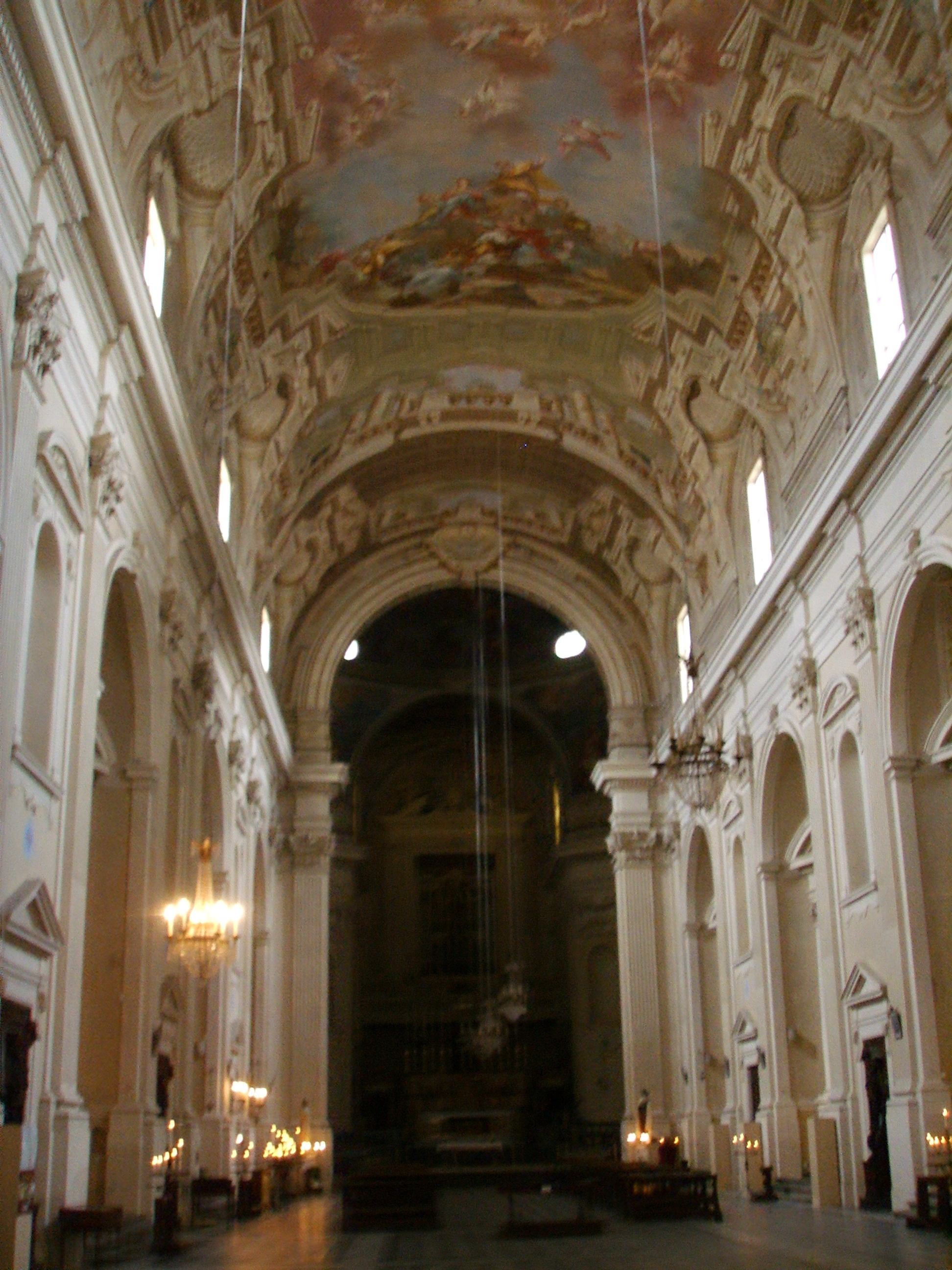 Santa Maria del Carmine, inside, Florence, Italy